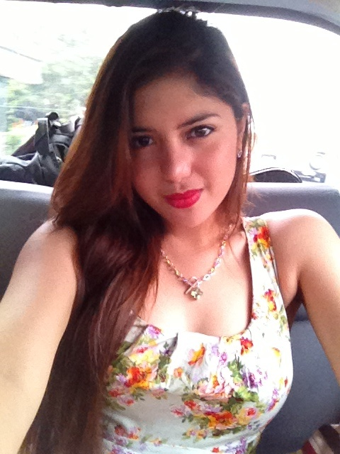 Isabella De Leon or Isabelle De Leon